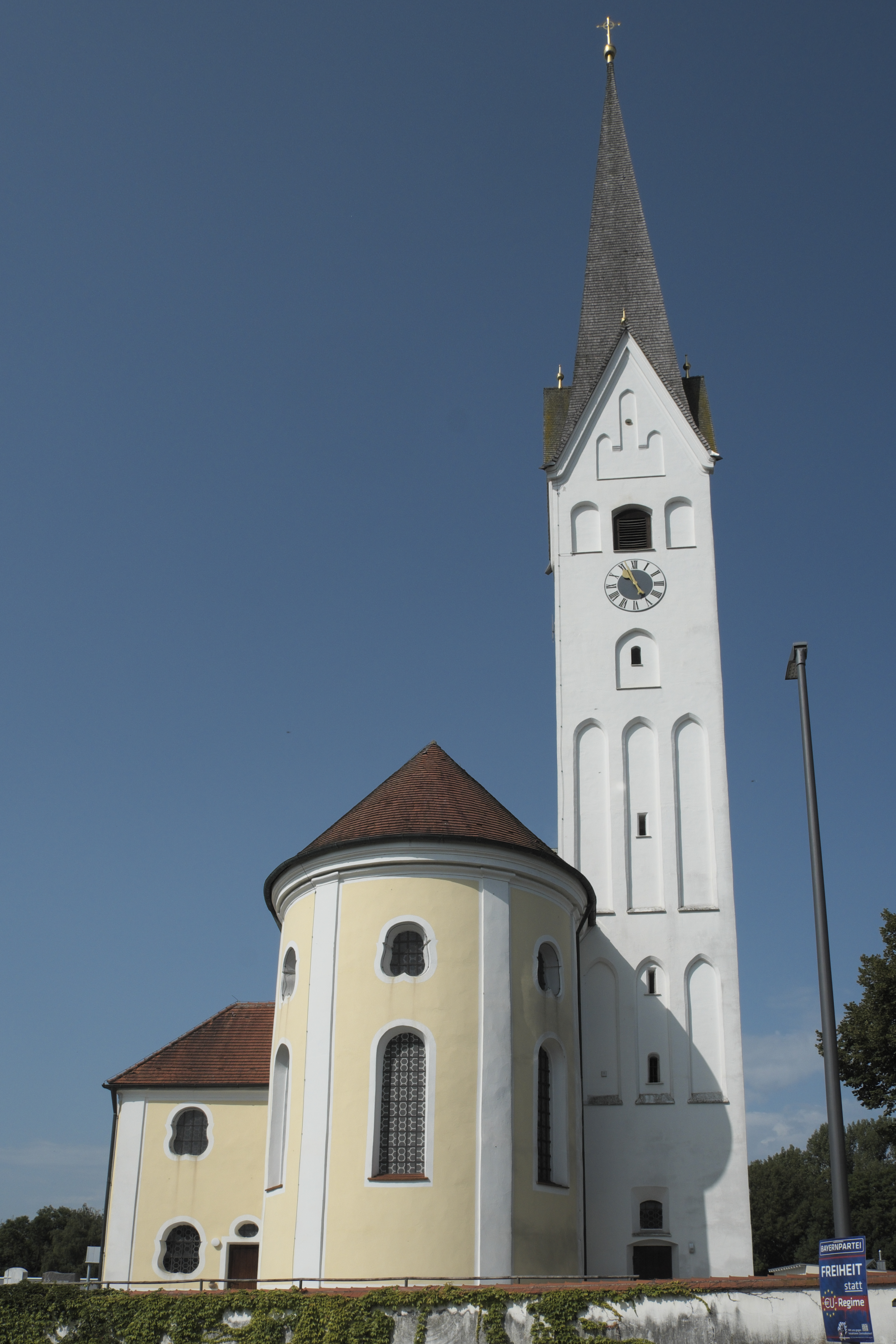 Katholische Pfarrkirche St. Florian in Fraunberg im Landkreis Erding (Bayern/Deutschland)